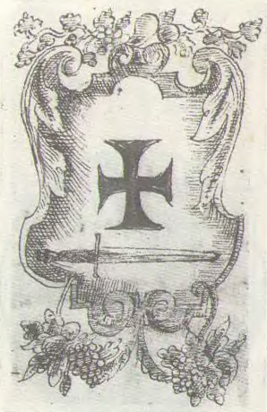 Беларуская (тарашкевіца): Герб Вяліжу (Vialiž) з канфірмацыйнага прывілею